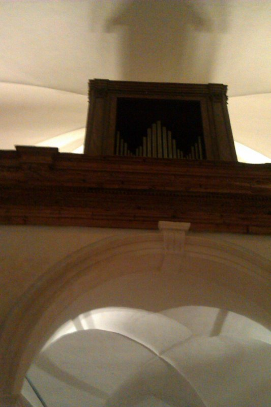 La chiesa di Santa Caterina d'Alessandria a Padova.